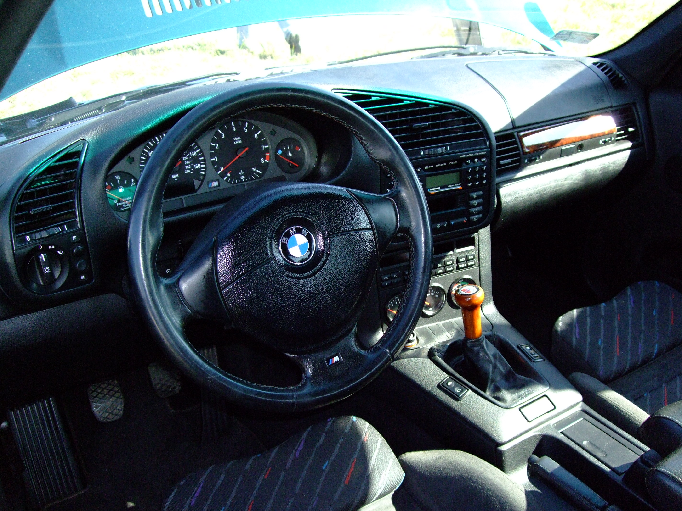 BMW M3 e36 3,2l coupe.